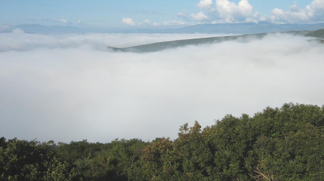 Fog in Algeria